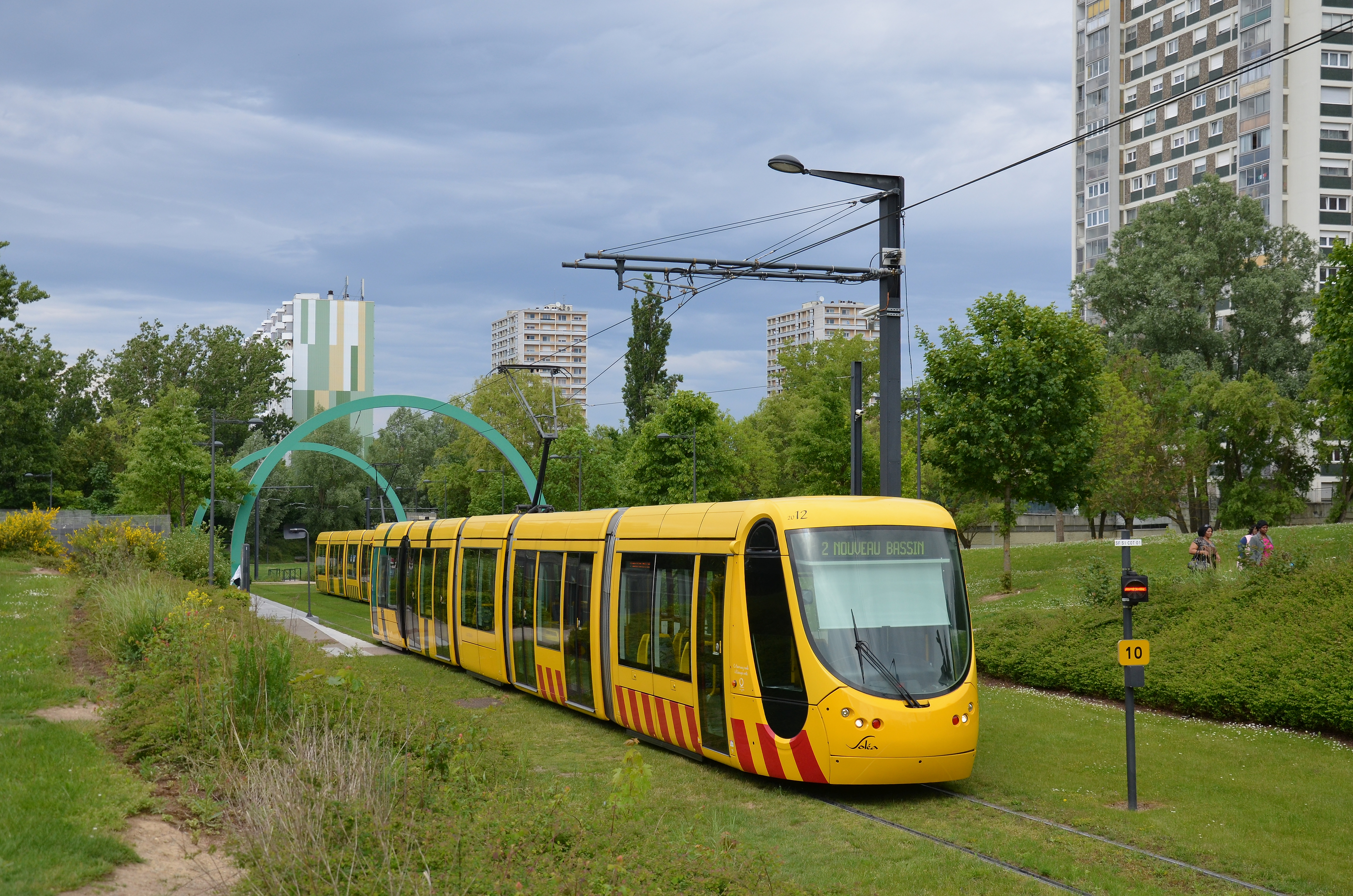 Alstom Citadis 302 n°2012 du réseau SOLEA de Mulhouse au terminus Coteaux sur la ligne 2.